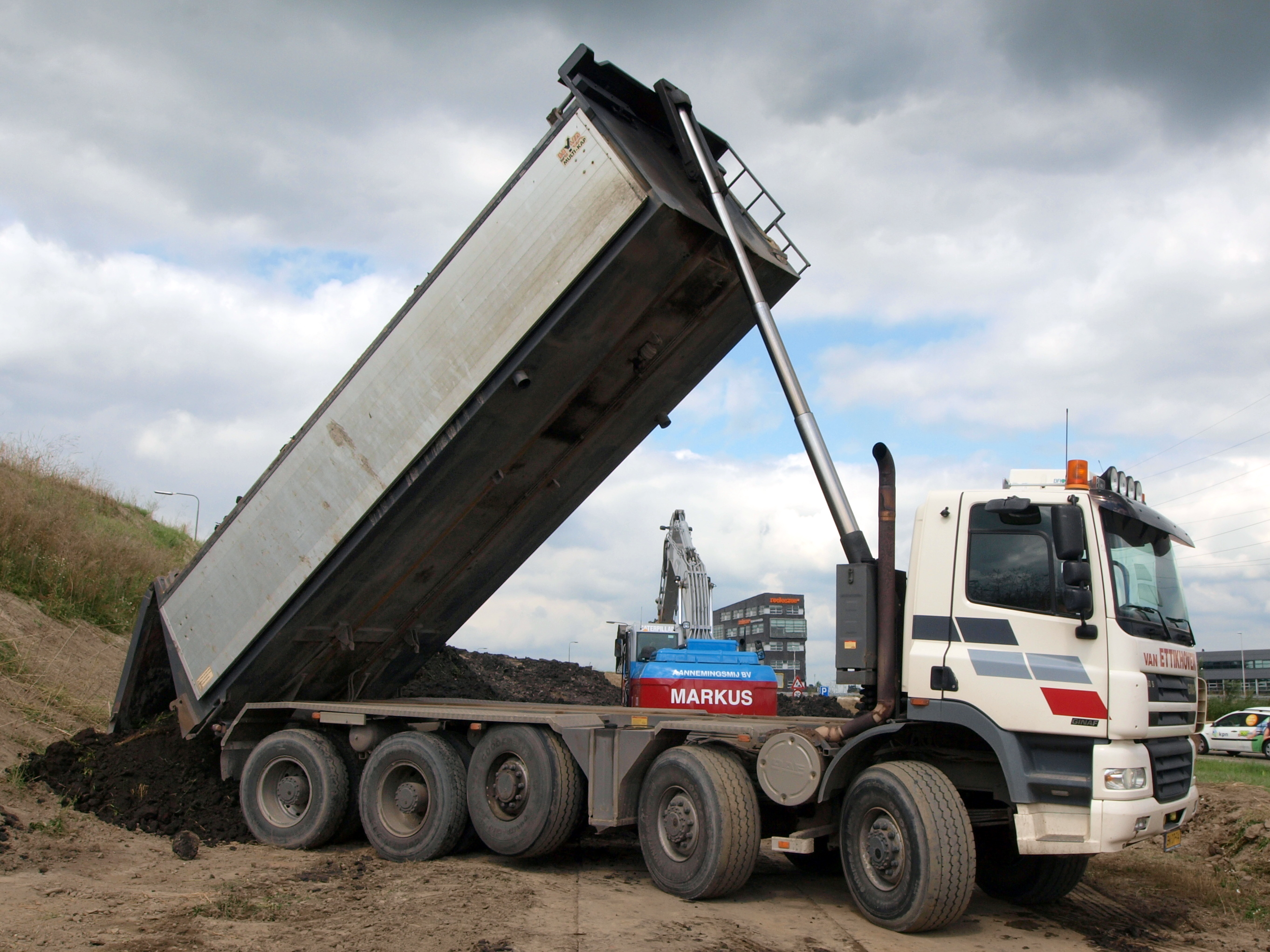 Ginaf X5450 S